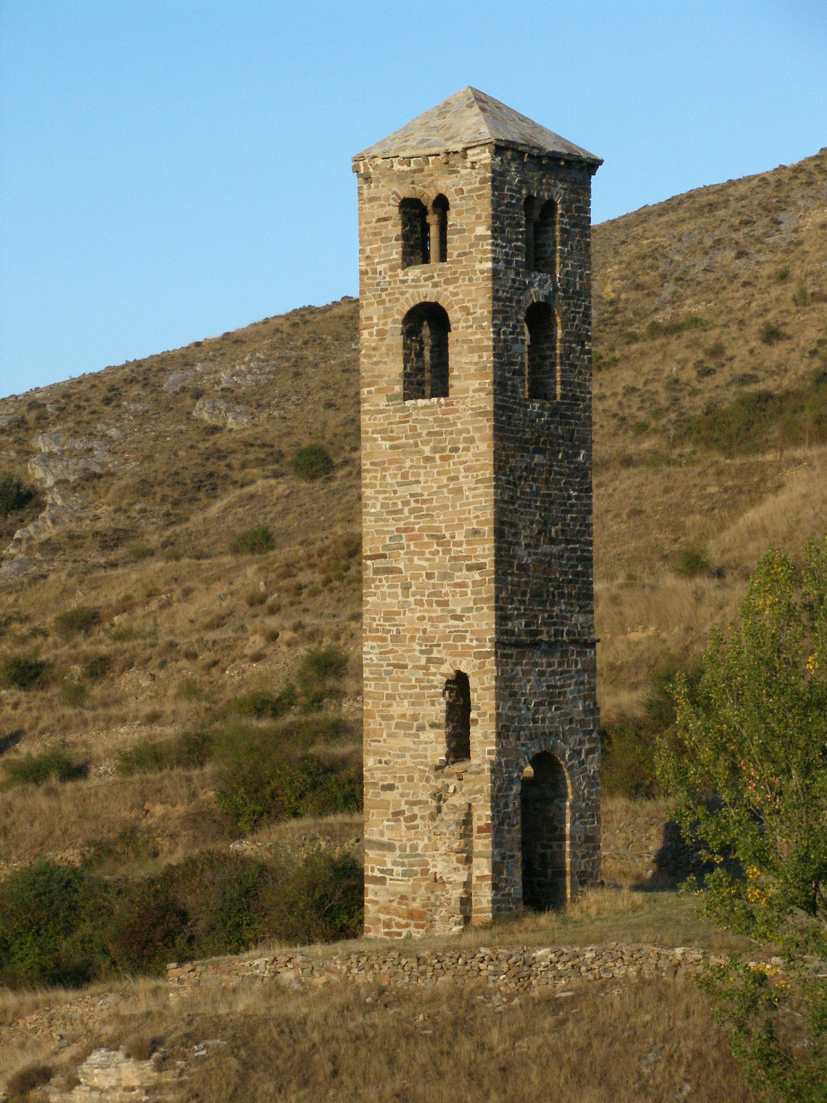 Torre de San Miguel, en Yanguas (Soria, España)